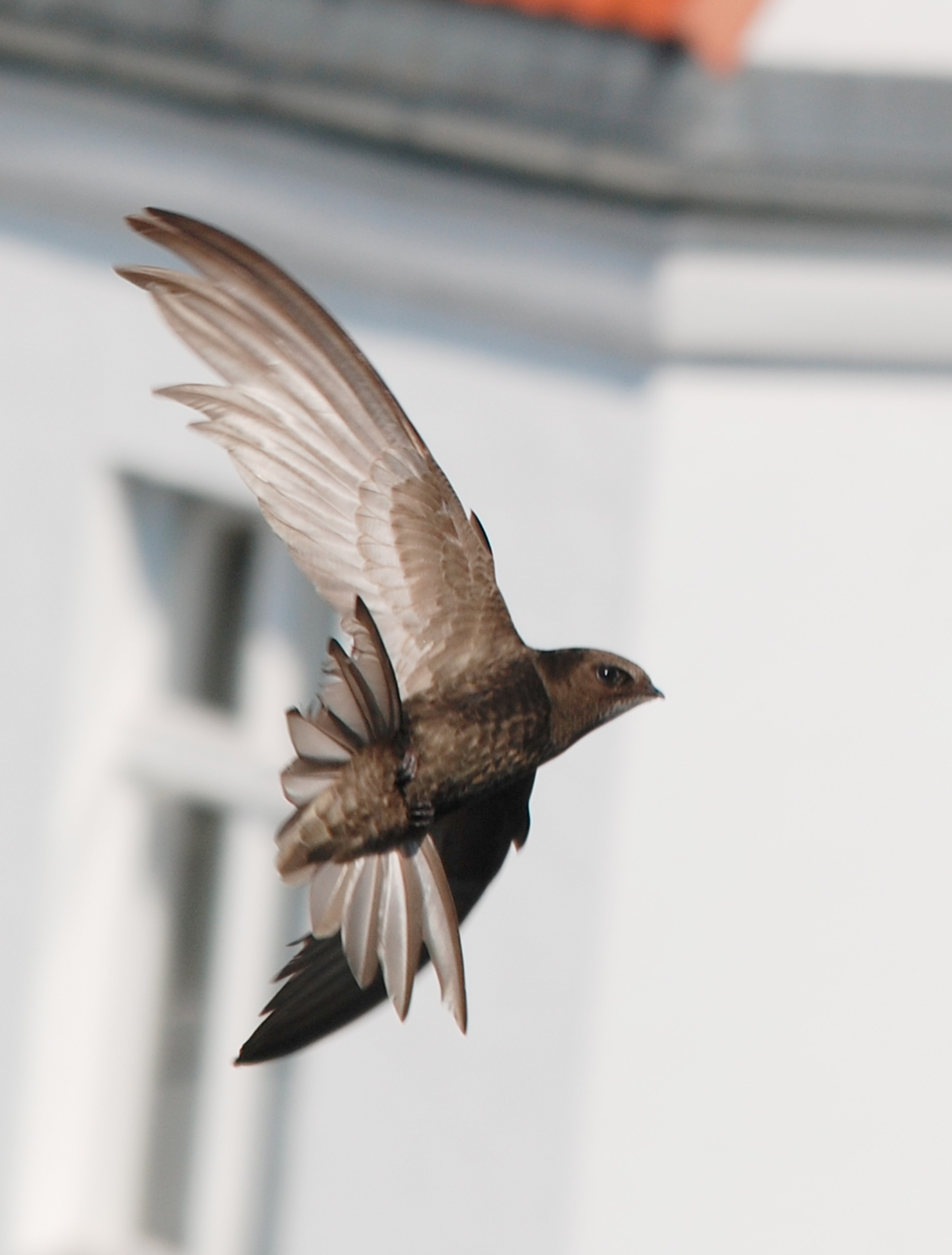 Bremsender Mauersegler beim Anflug der Bruthöhle